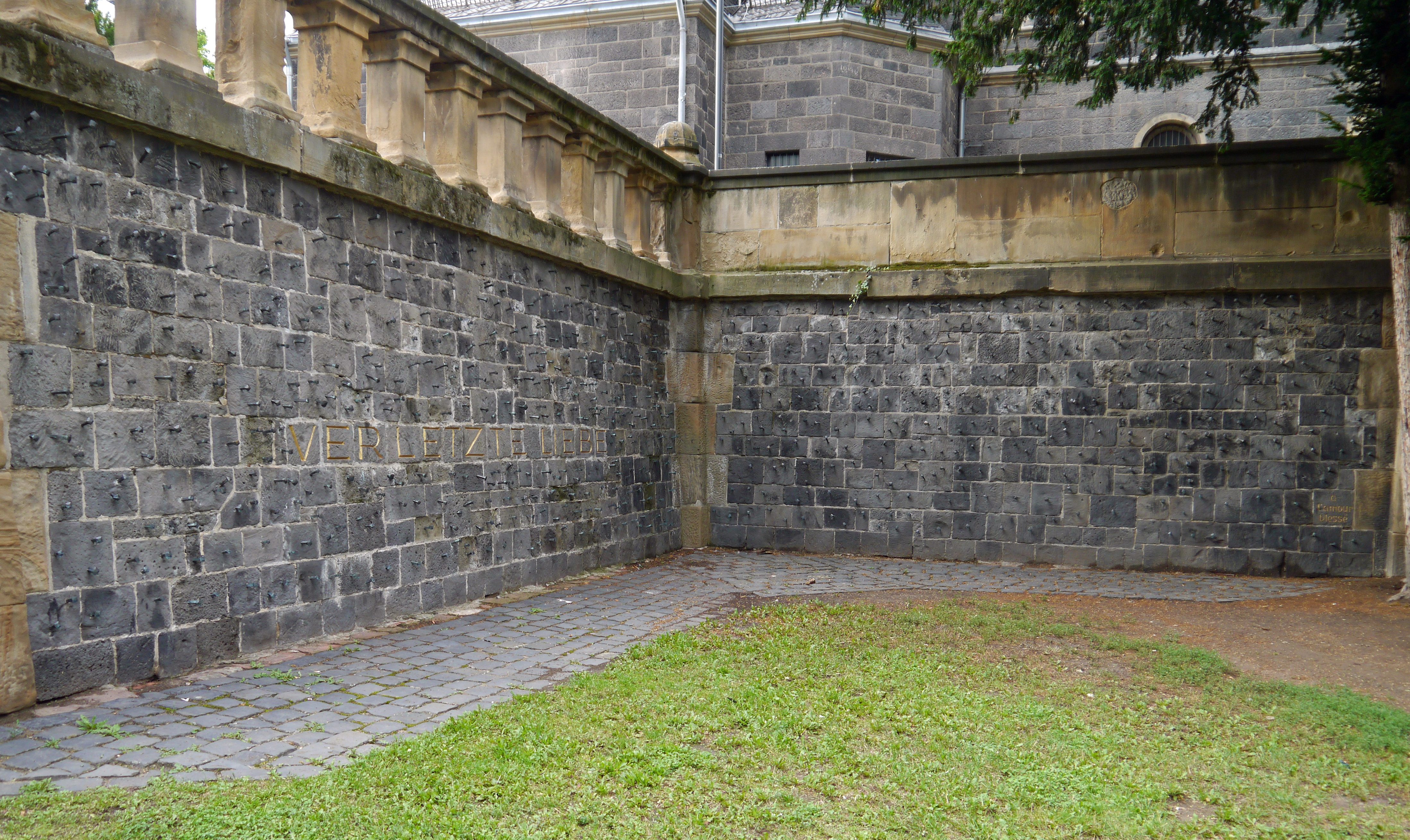 Denkmal VERLETZTE LIEBE. 2012 auf dem Peterskirchhof in Ffm.